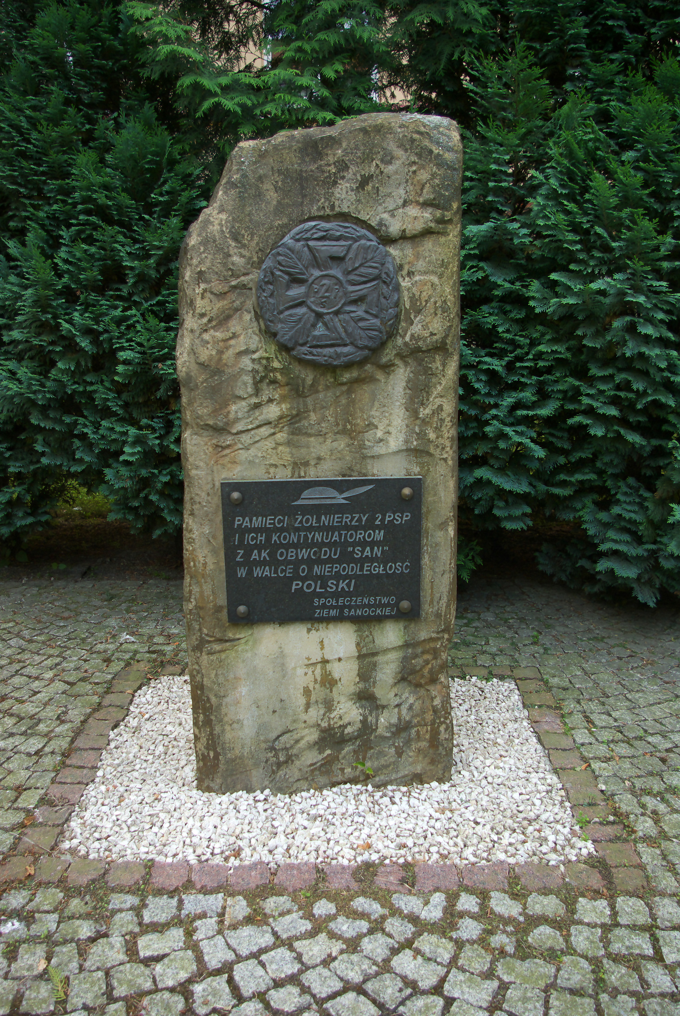 Kamień pamiątkowy upamiętniający 2 Pułk Strzelców Podhalańskich i oddział OP-23 Armii Krajowej w Sanoku